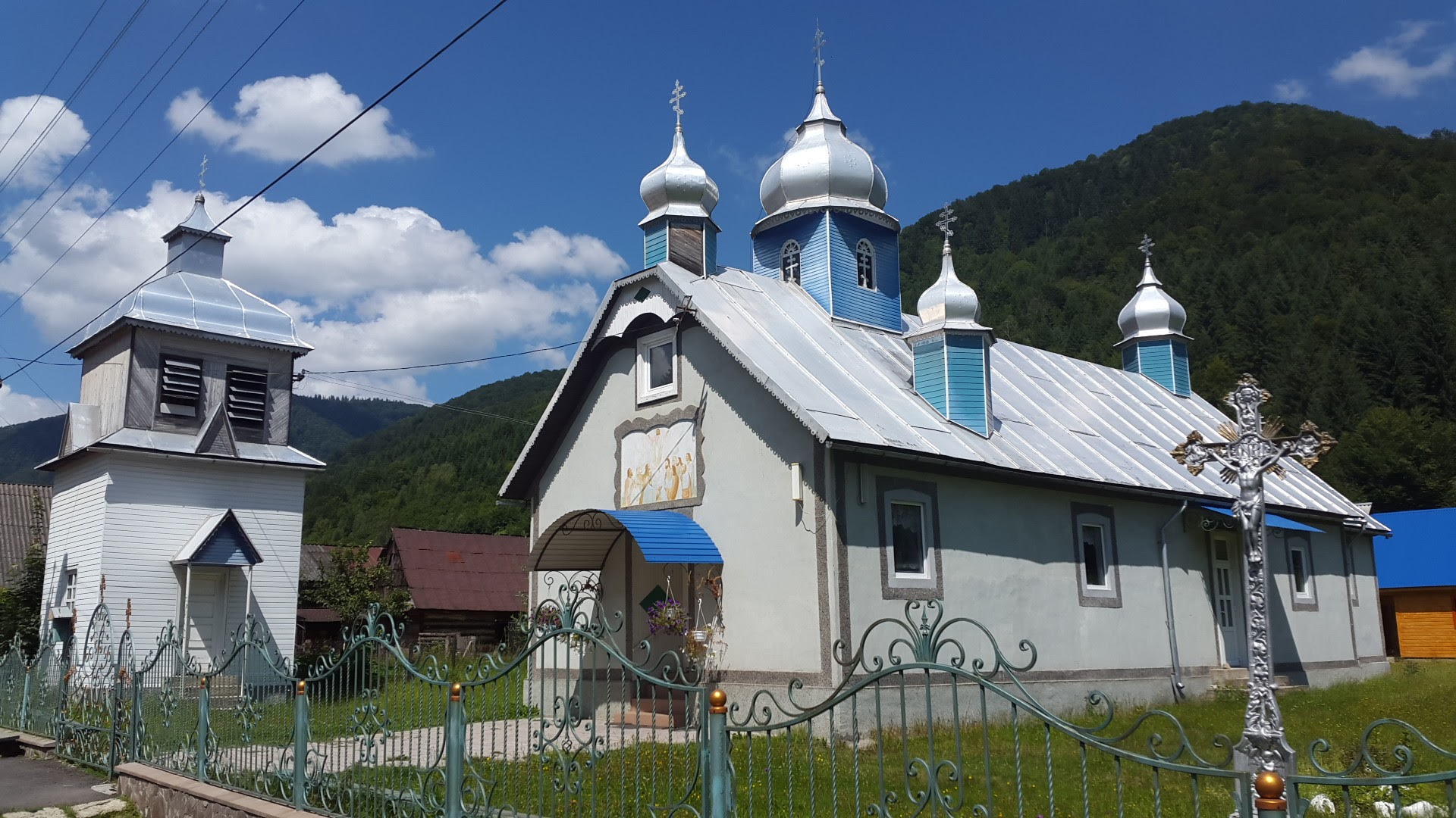 Православна церква в с. Руська Мокра (панорама)